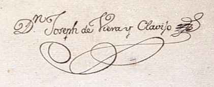 Firma del ilustrado canario José de Viera y Clavijo, obtenida de un manuscrito antiguo.